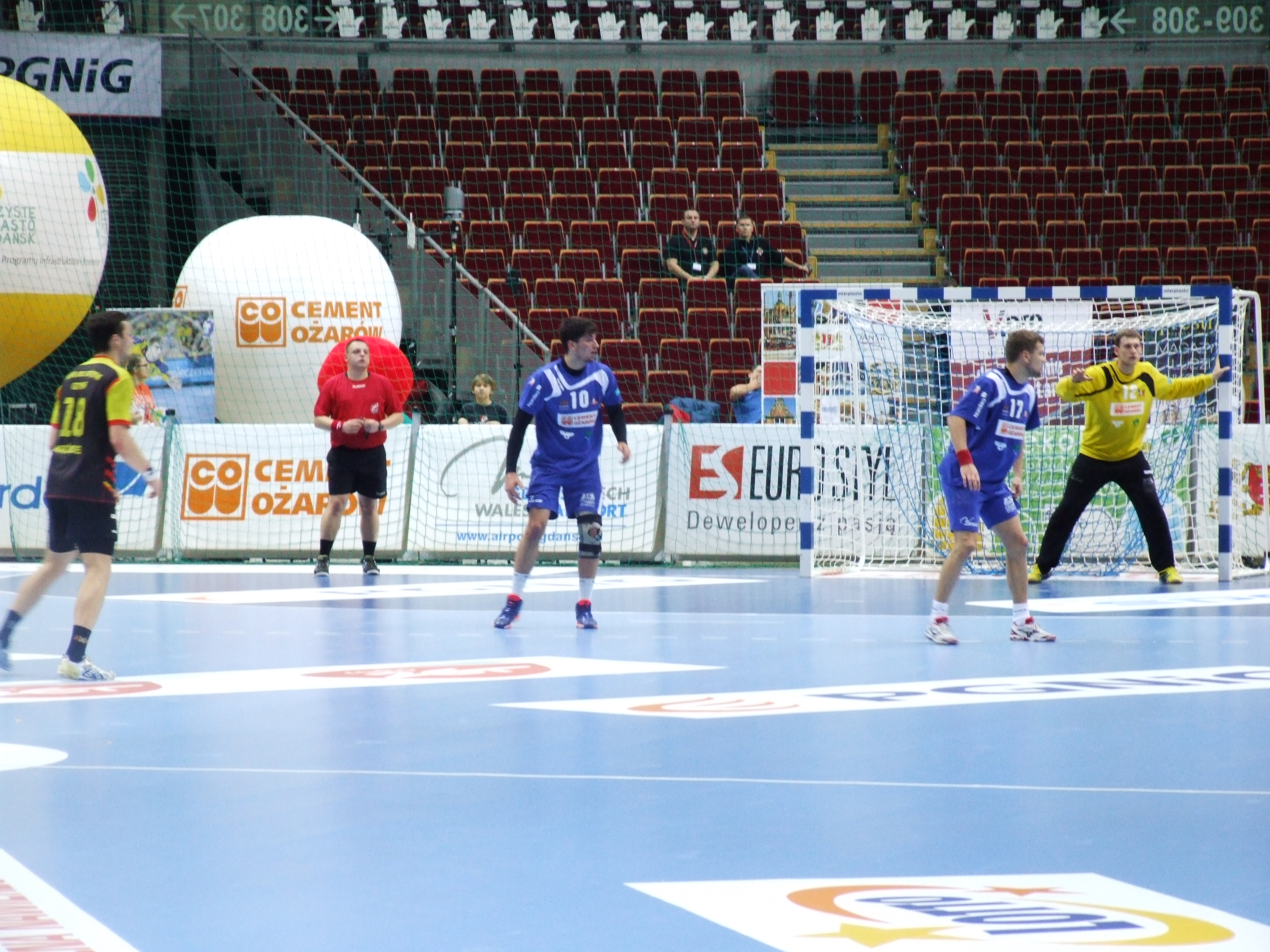 Mecz I ligi piłki ręcznej SPR Wybrzeże Gdańsk - Kar-Do Spójnia Gdynia